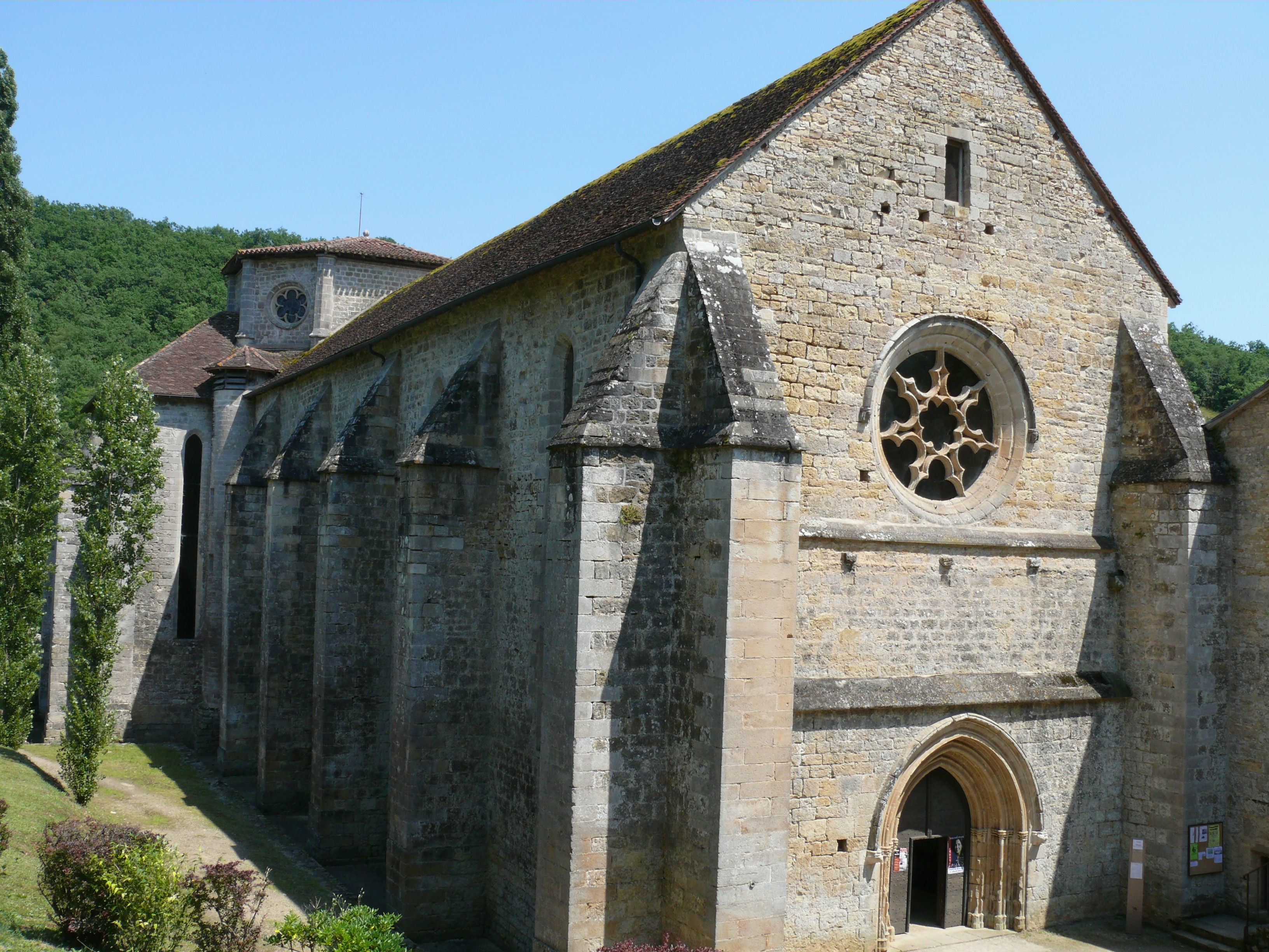 Abbaye de Beaulieu-en-Rouergue - Eglise